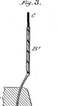 Detailzeichnung aus US Patent 266358